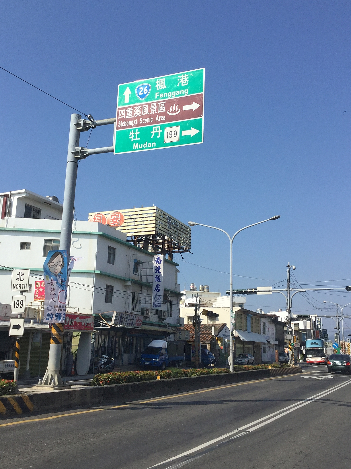 台26線於車城鄉